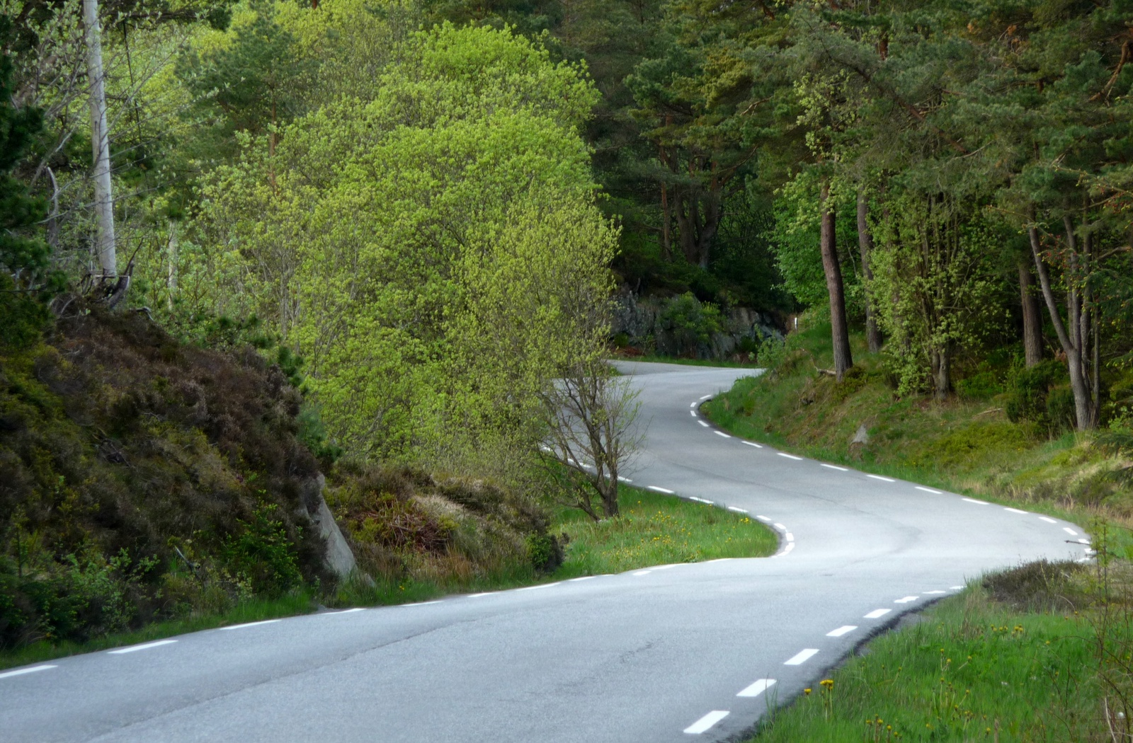 Karmøy 05.2010